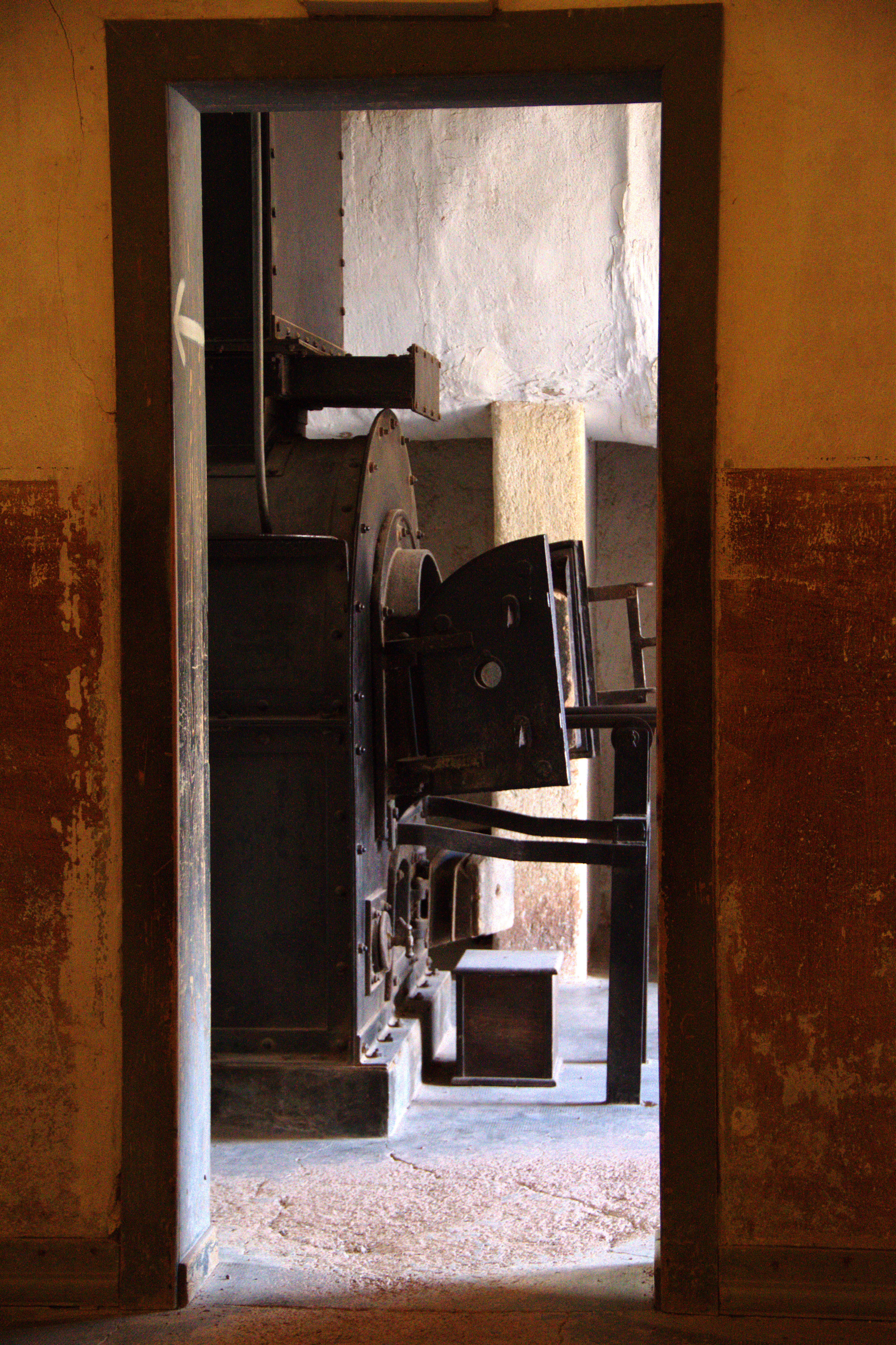 Camp de concentration de Natzwiller-Struthof. Le four crématoire.